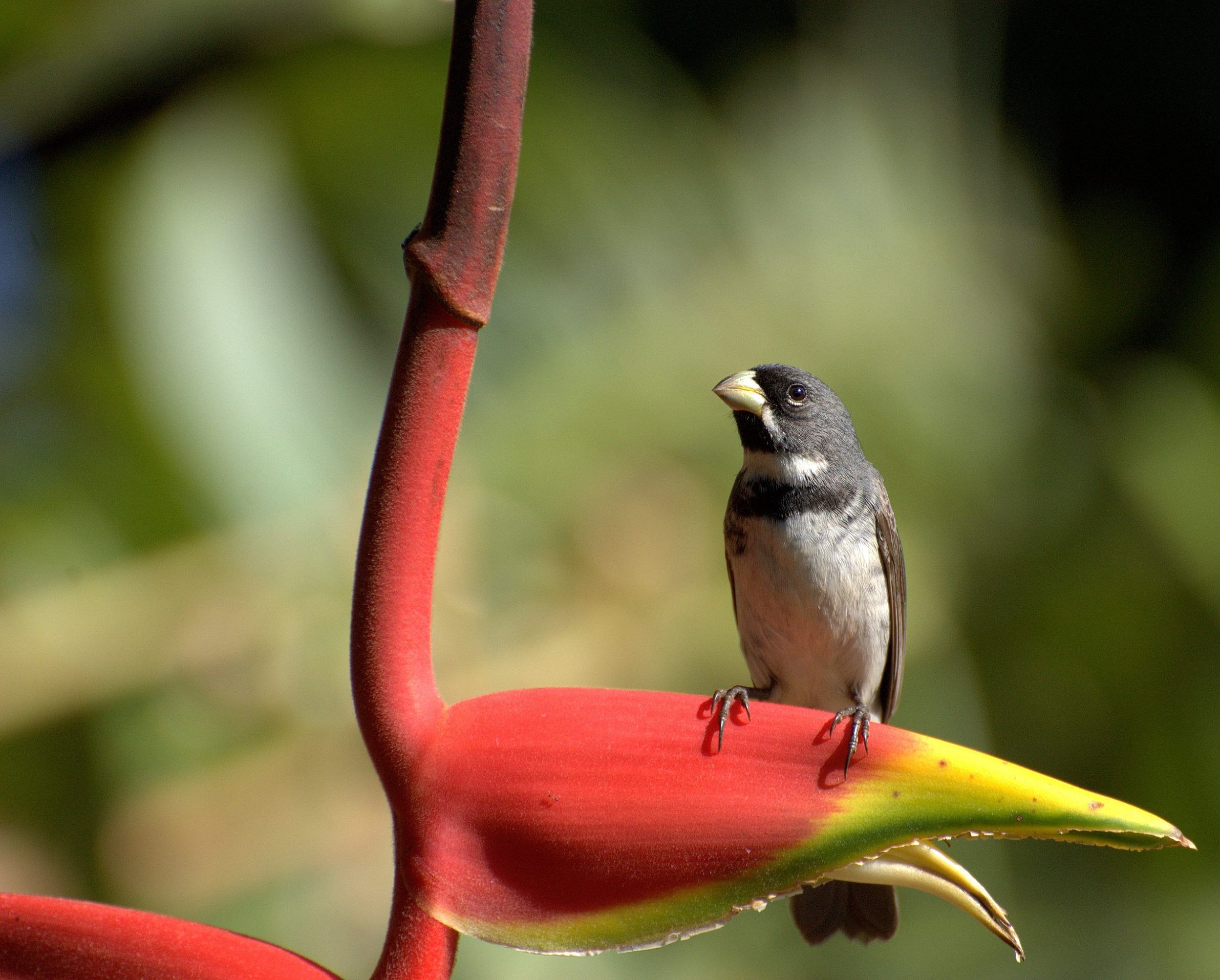 EPR - VIVEIRO DE MUDAS NATIVAS - Fazenda Vô-Vó - Piraju-SP .br/index.php.htm